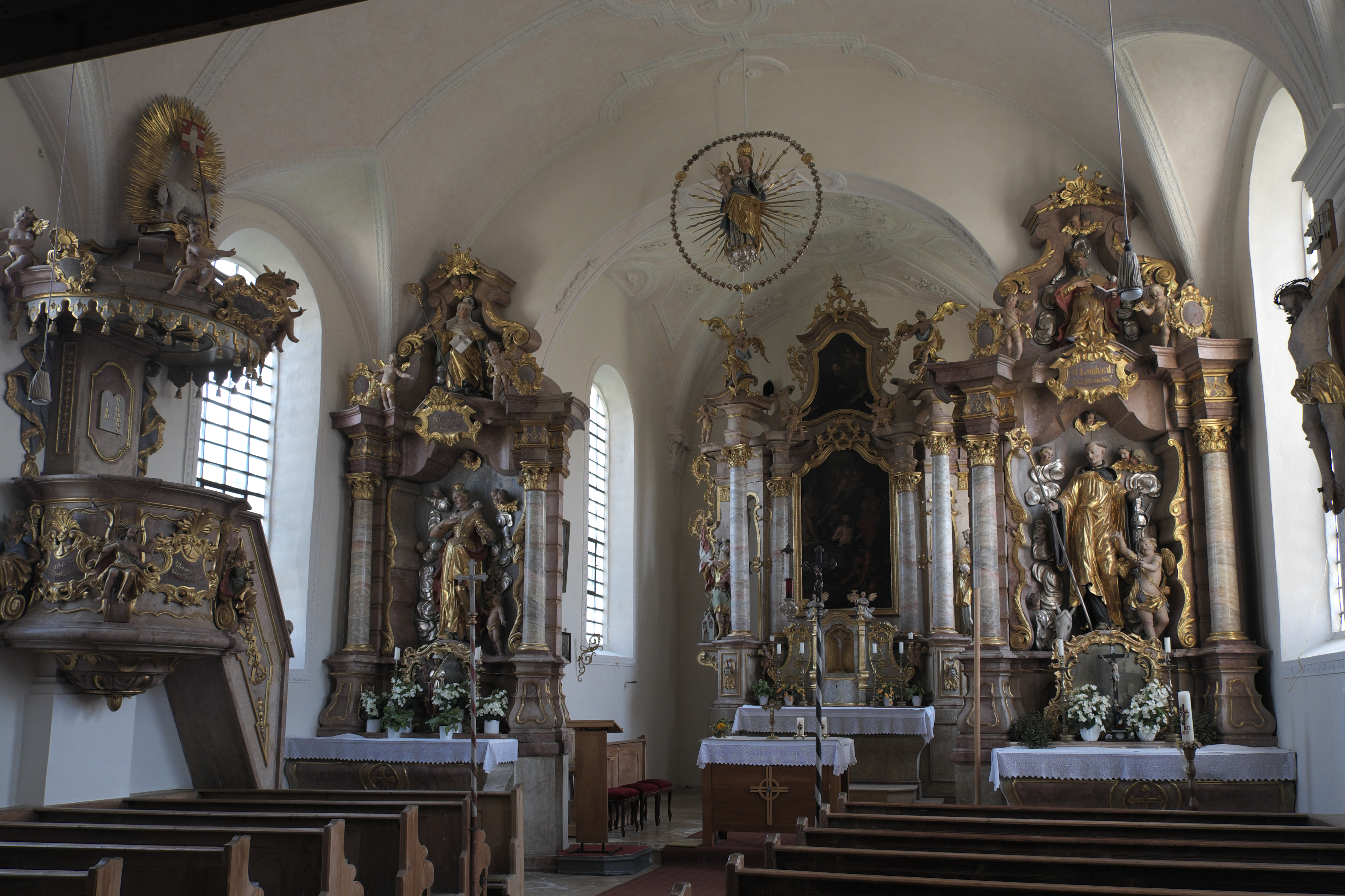 Katholische Filialkirche St. Vitus in Grucking (Fraunberg) im Landkreis Erding (Bayern/Deutschland), Innenraum